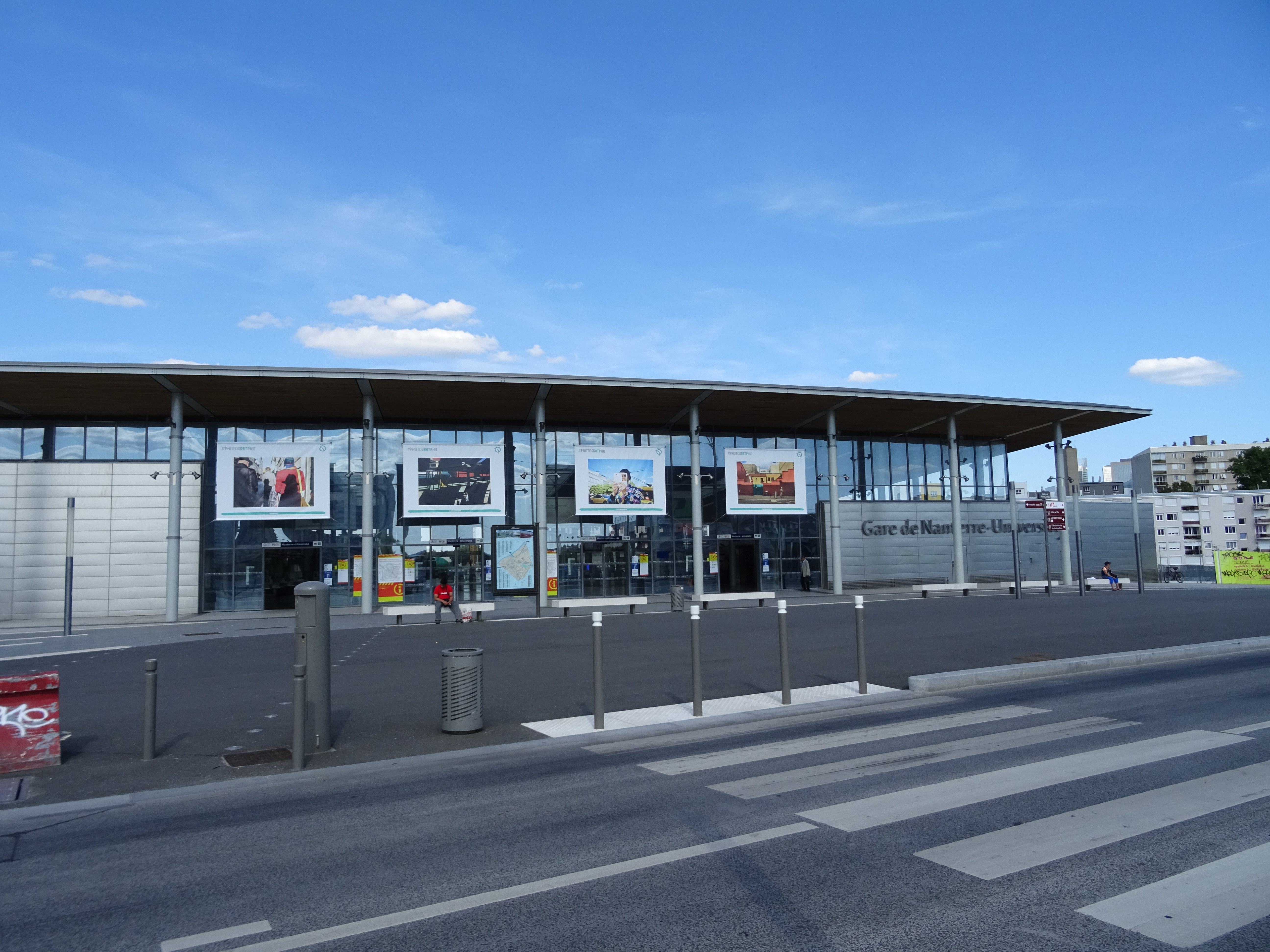 Vue de face de la gare de Nanterre